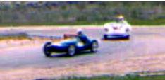 Bandini 750 sport siluro